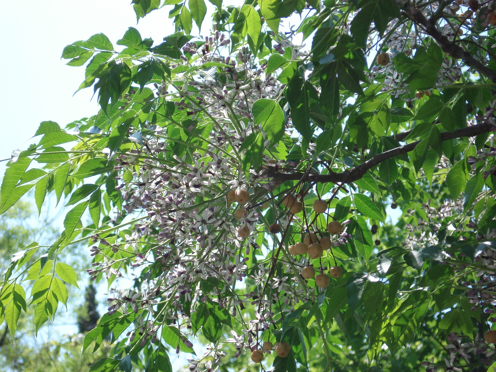 Melia azedarach: foglie, infiorescenze e frutti